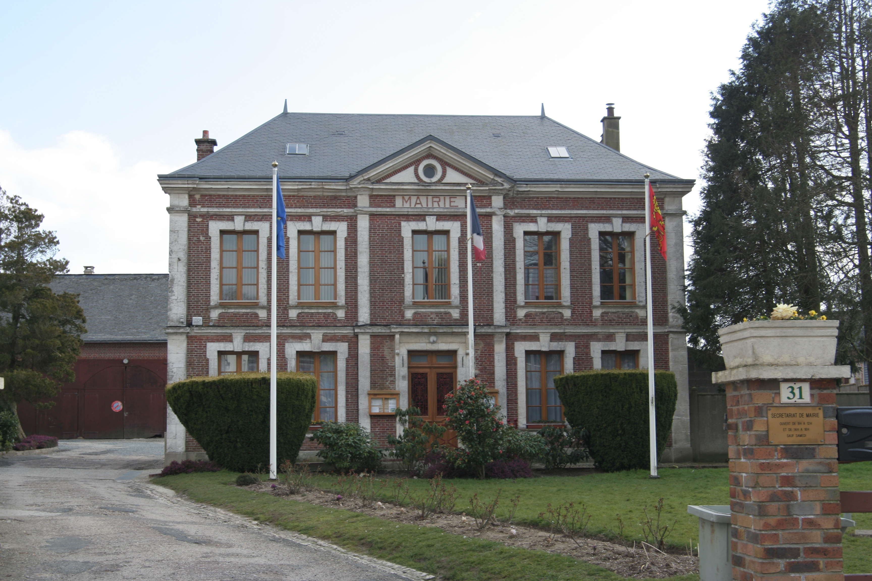 La mairie des Loges.